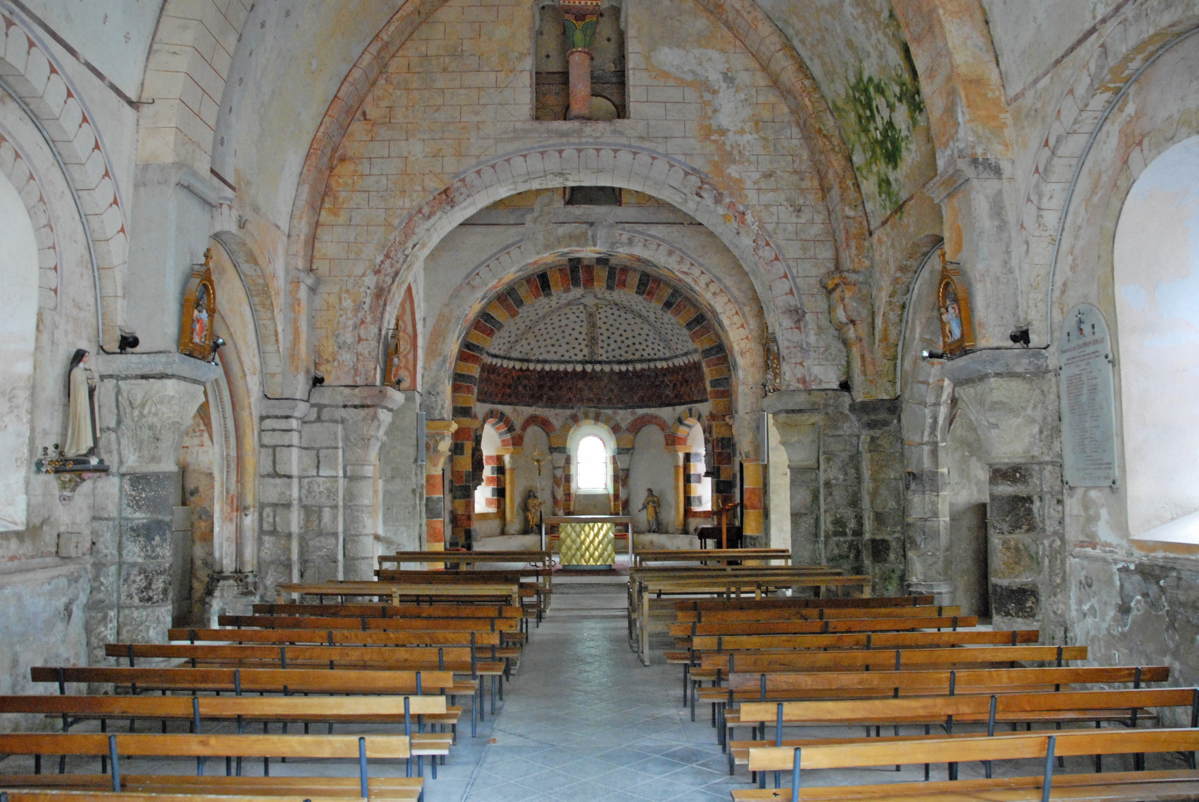 Dorfkirche Chambon-sur-Lac, Schiff z. Chor